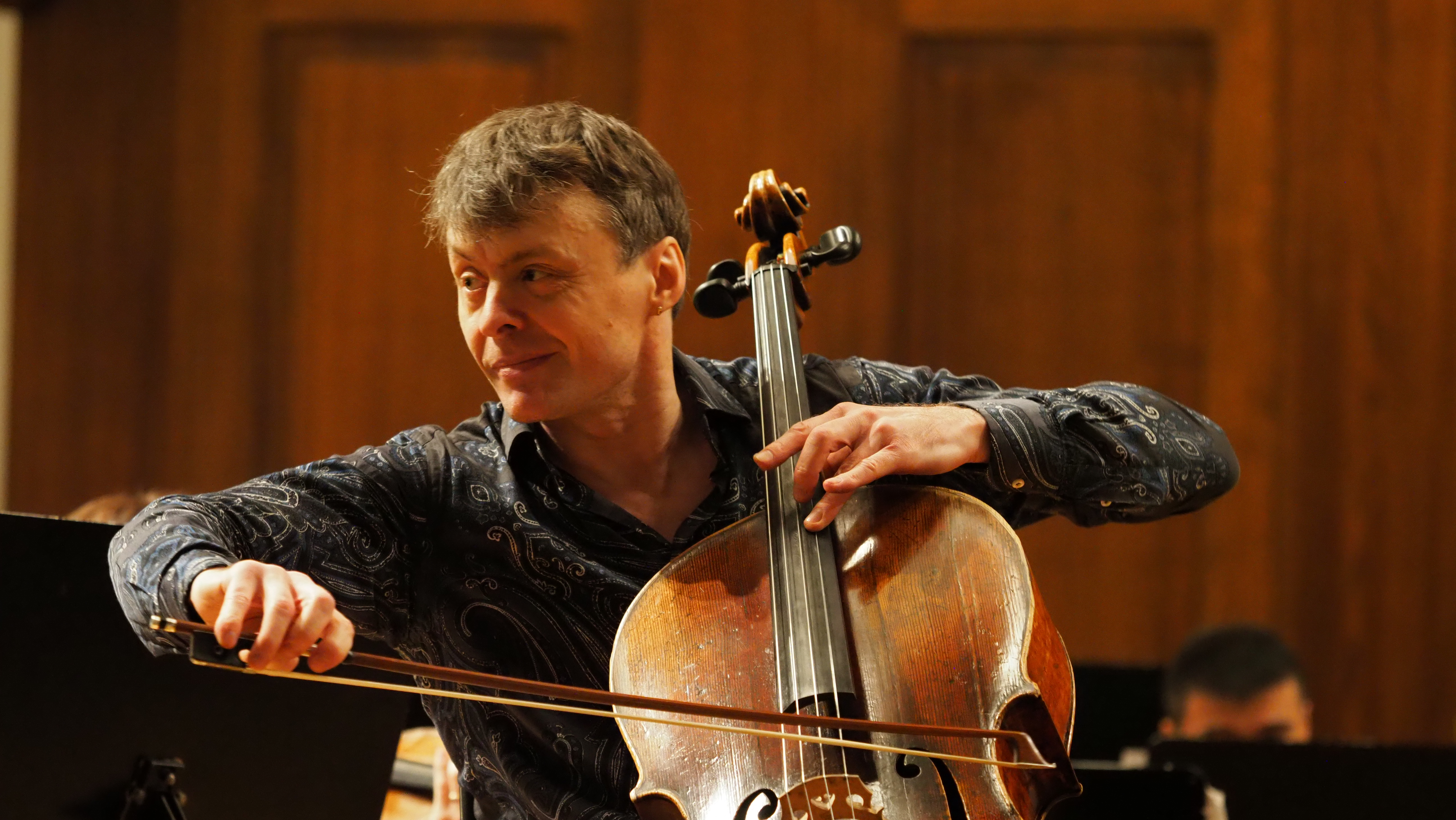 рустам комачков